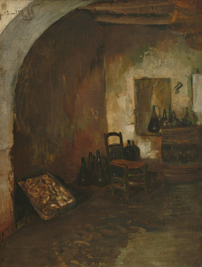 "Capri, 1878" (Blick in einen Gewölbekeller mit zahlreichen Karaffen und Gemüse). Öl auf Holz, 60 x 45 cm